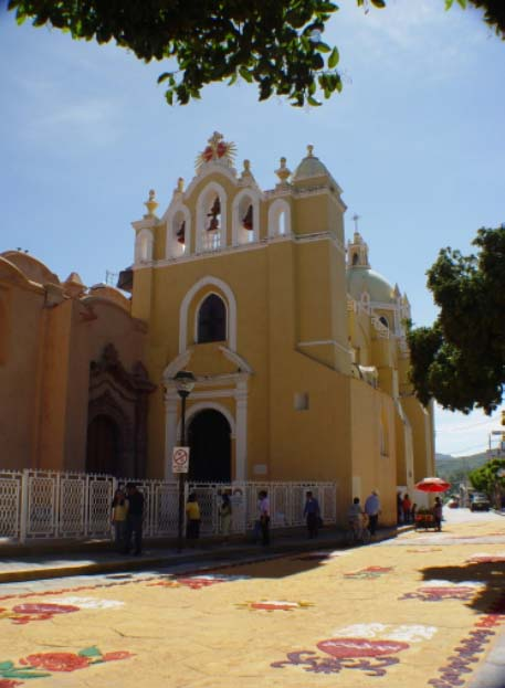 Alfombra a un costado del Sagrario Diocesano